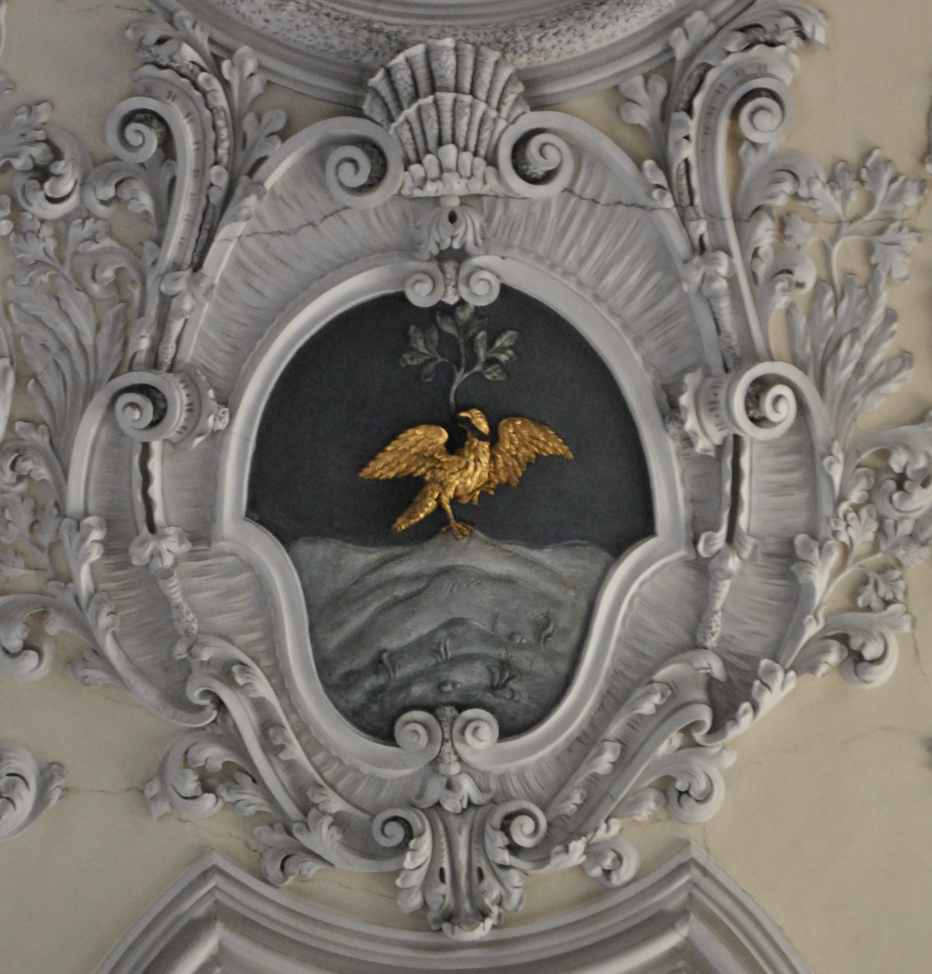 Katholische Klosterkirche Sankt Michael, dreischiffige Säulenbasilika mit Ostquerschiff und zwei Chortürmen mit Welschen Hauben sowie Westvorhalle, im Kern 2.Hälfte 12. Jahrhundert, Einwölbung 1. H. 17. Jahrhundert, Fassade im römischen Barock 1696, Chor und Chortürme nach Abbruch (1838) 1901 wiedererrichtet, mit Ausstattung, Stuckwappen Abt Sigmund Hauck, D-6-79-209-55